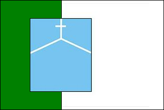 Bandeira de Conceição do Almeida - Bahia